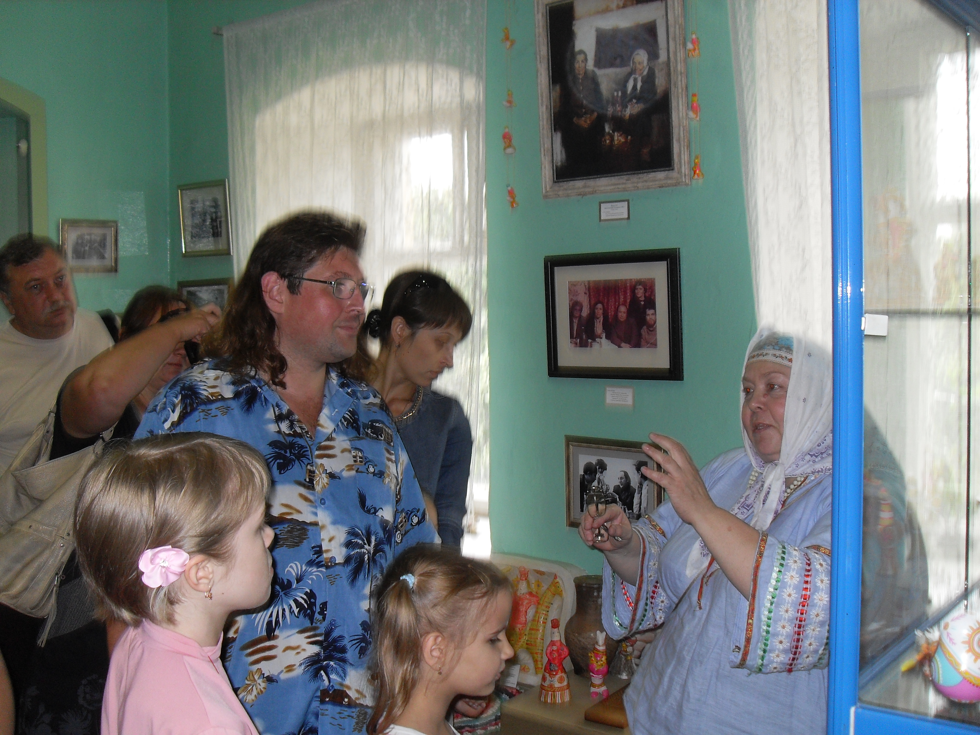 Экскурсия в музее "Филимоновская игрушка"